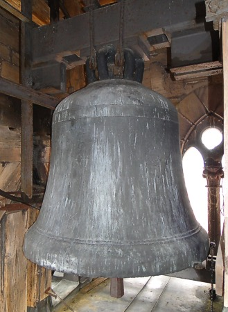 Kunigundenglocke des Bamberger Doms